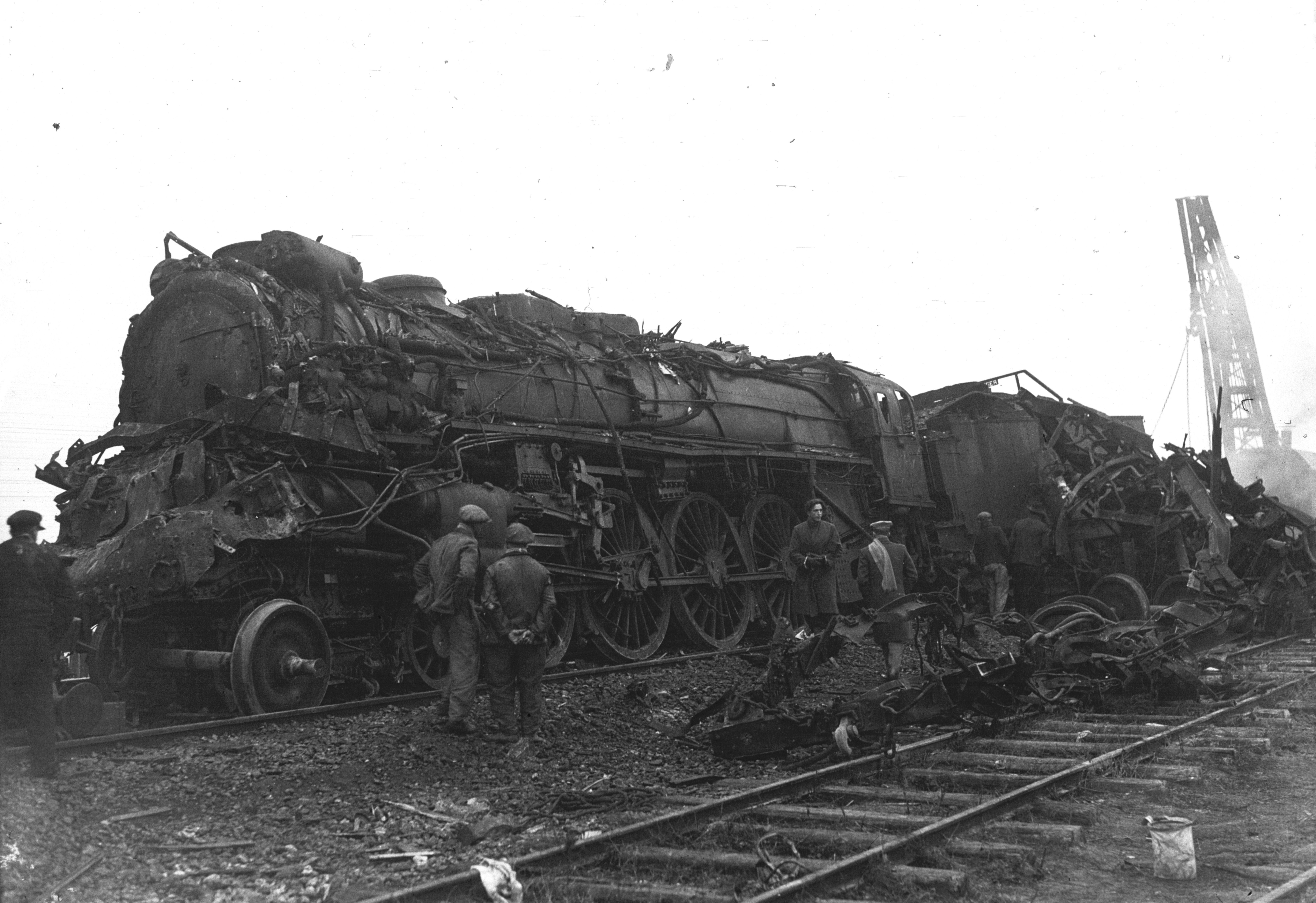 La locomotive du train tamponneur